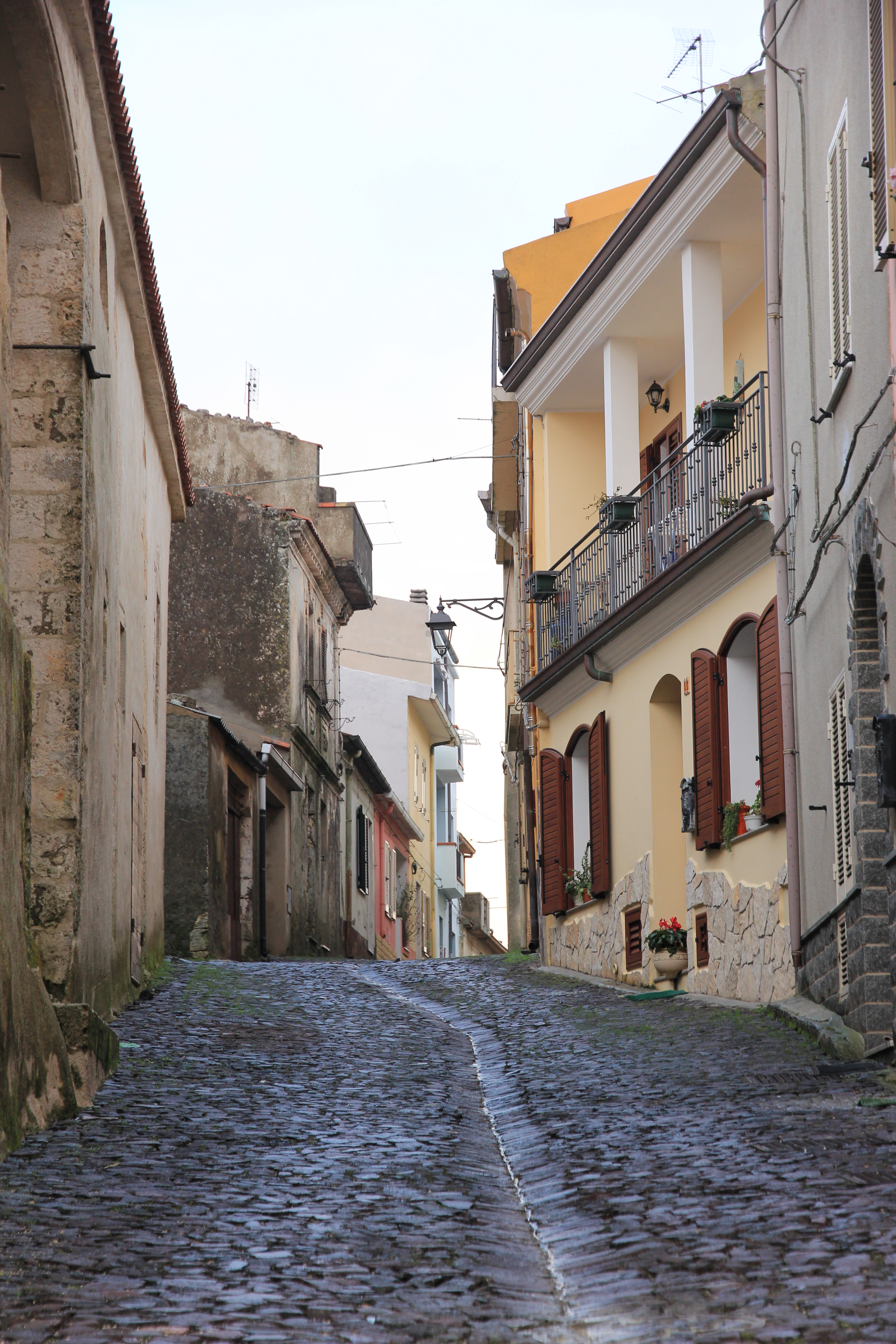 Osilo - Centro storico